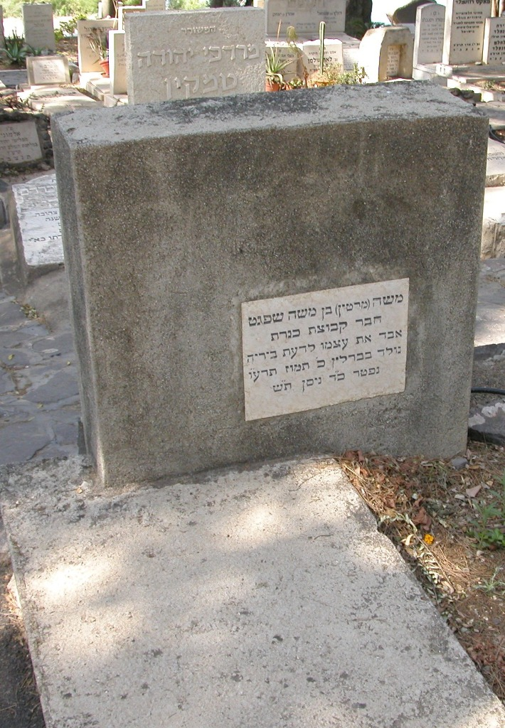 Burial In Kineret.jpg